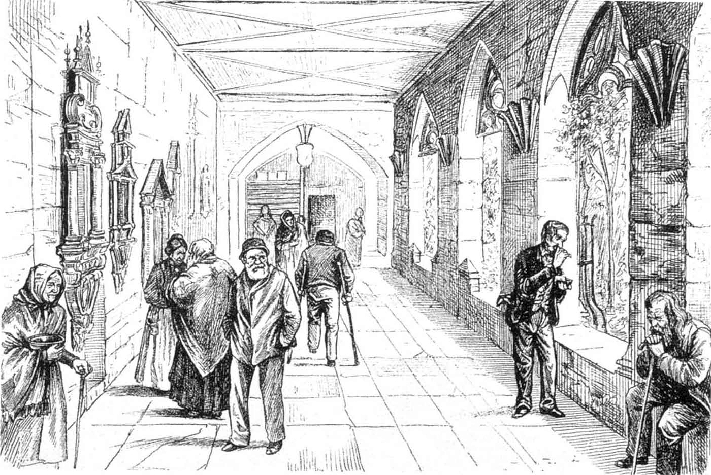 „Bürgerhospitaliten beim Luftschnappen im Kreuzgang“, Zeichnung und Lithographie von C. Schacher (erwähnt 1830–1860/1865).